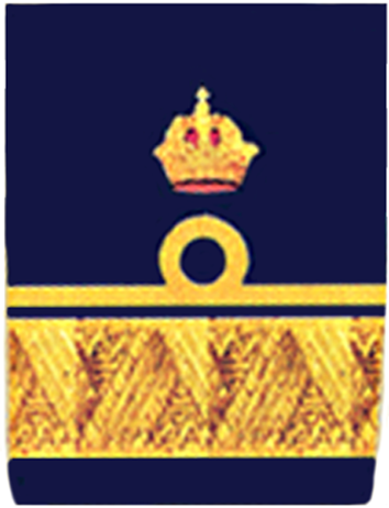 Kontreadmiral der k.u.k. Kriegsmarine